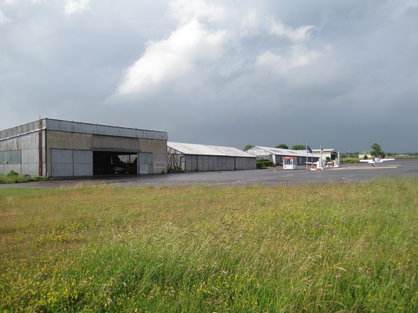 Aérodrome de Dijon-Darois